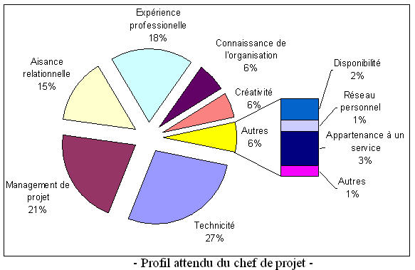 Profil attendu des chefs de projets